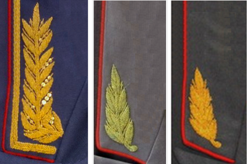 Генералы мвд